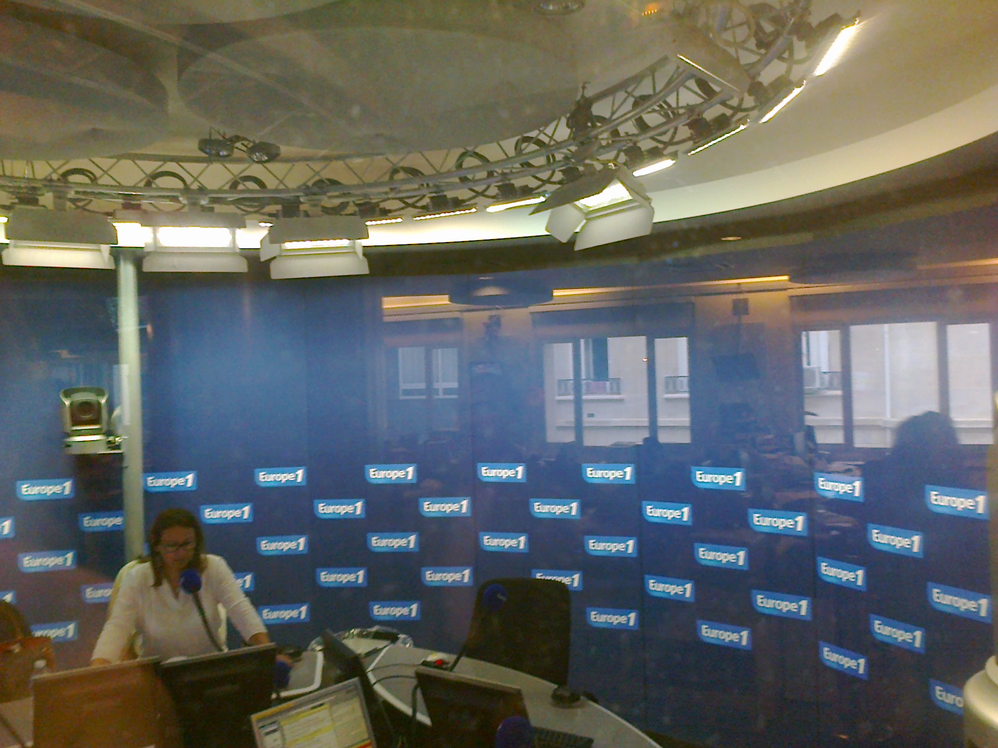 Studio Lagardère - Europe 1